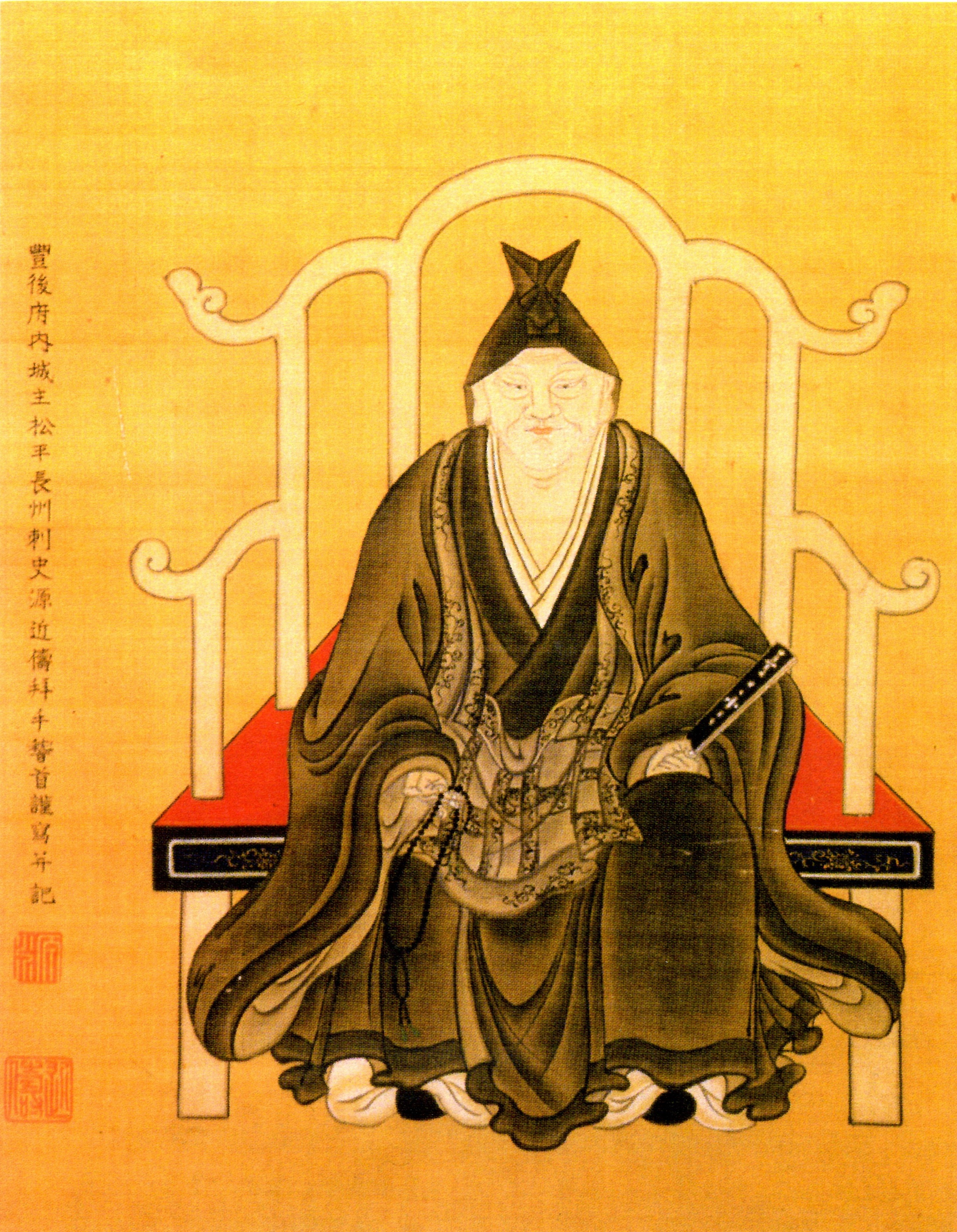 松平(大給)忠昭の肖像。